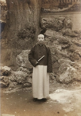 杨文恺 银盐照片